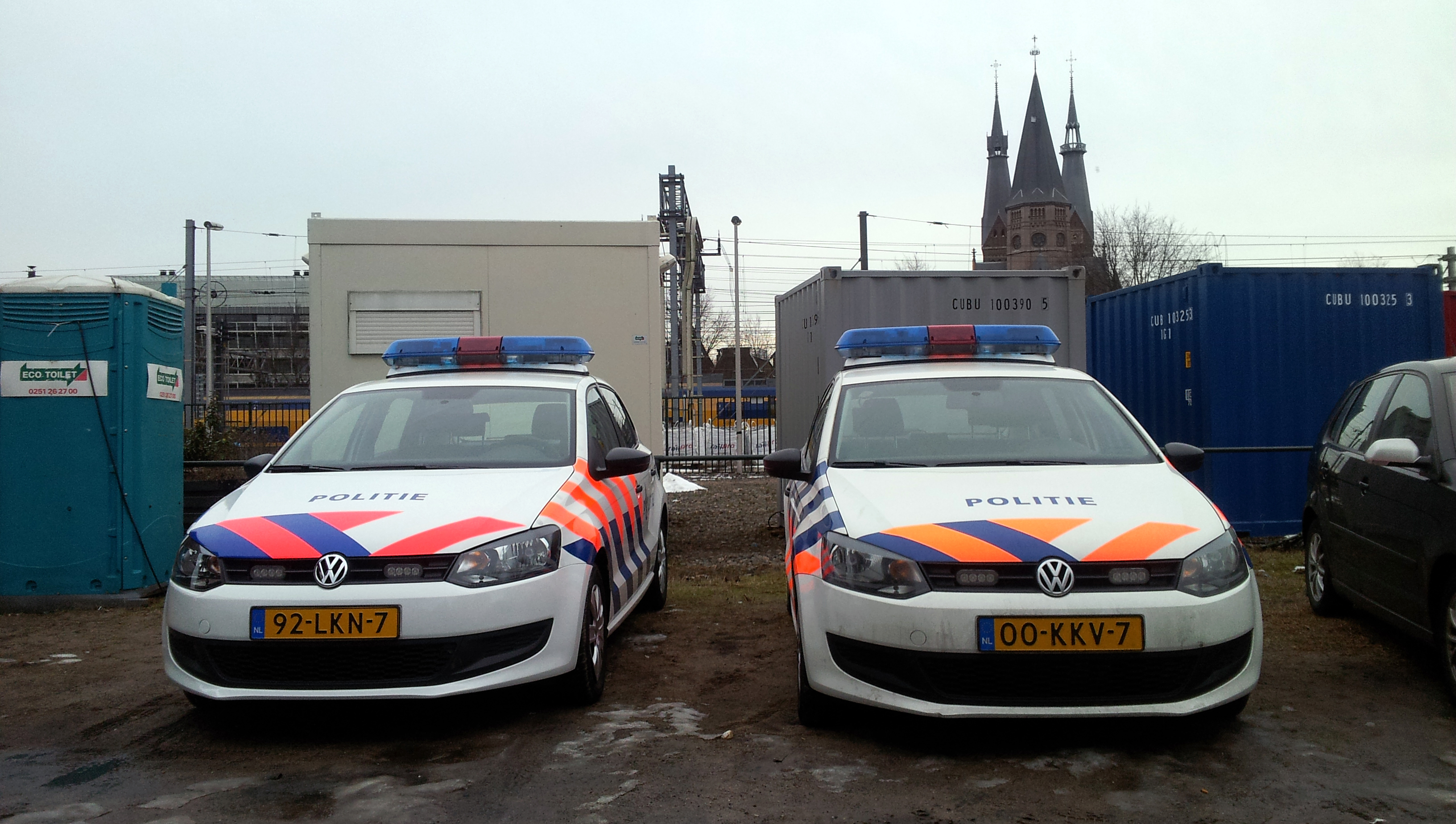 Opvallende politievoertuigen Spoorwegpolitie Noordwest